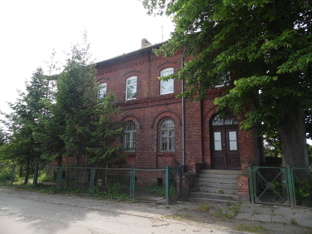 PKP. Budynek kolejowy.